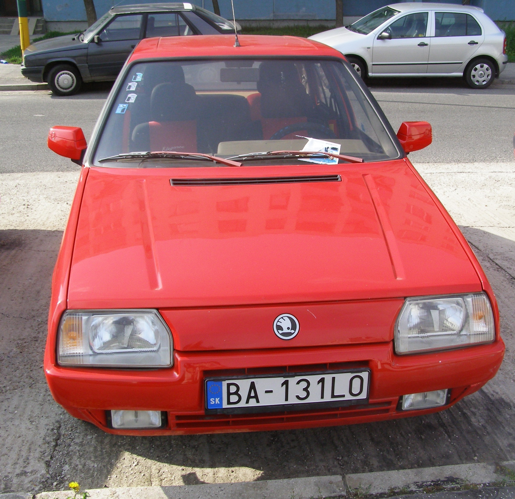 Skoda Favorit 135 LS